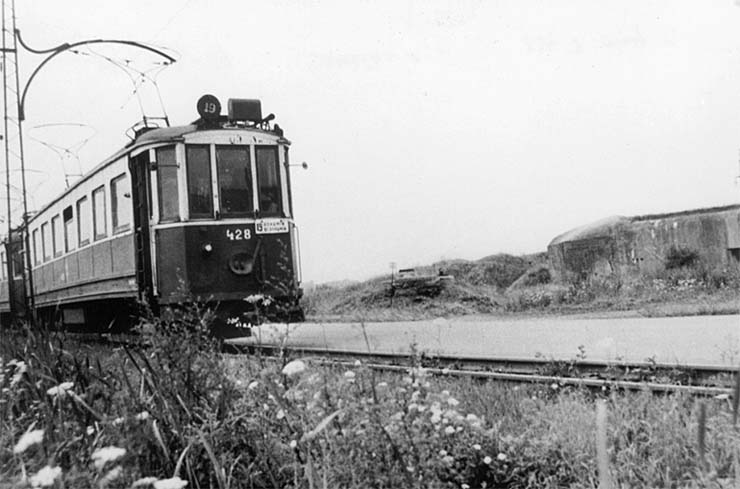 Bohumínská tramvaj (#428) focená poblíž pěchotního srubu MO-S 4 "U šedé vily" (dnes prostor U transformátoru).